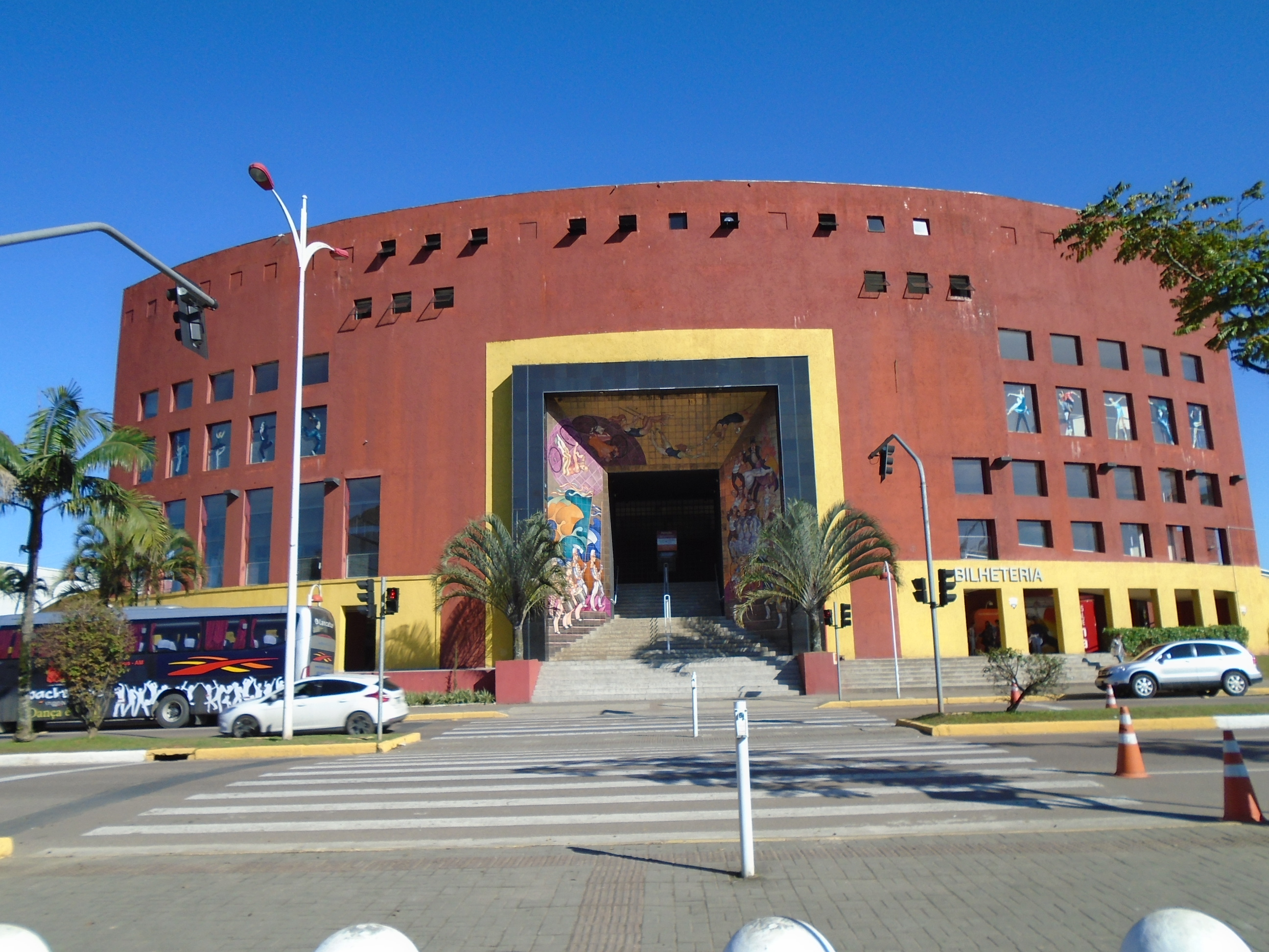 Joinville